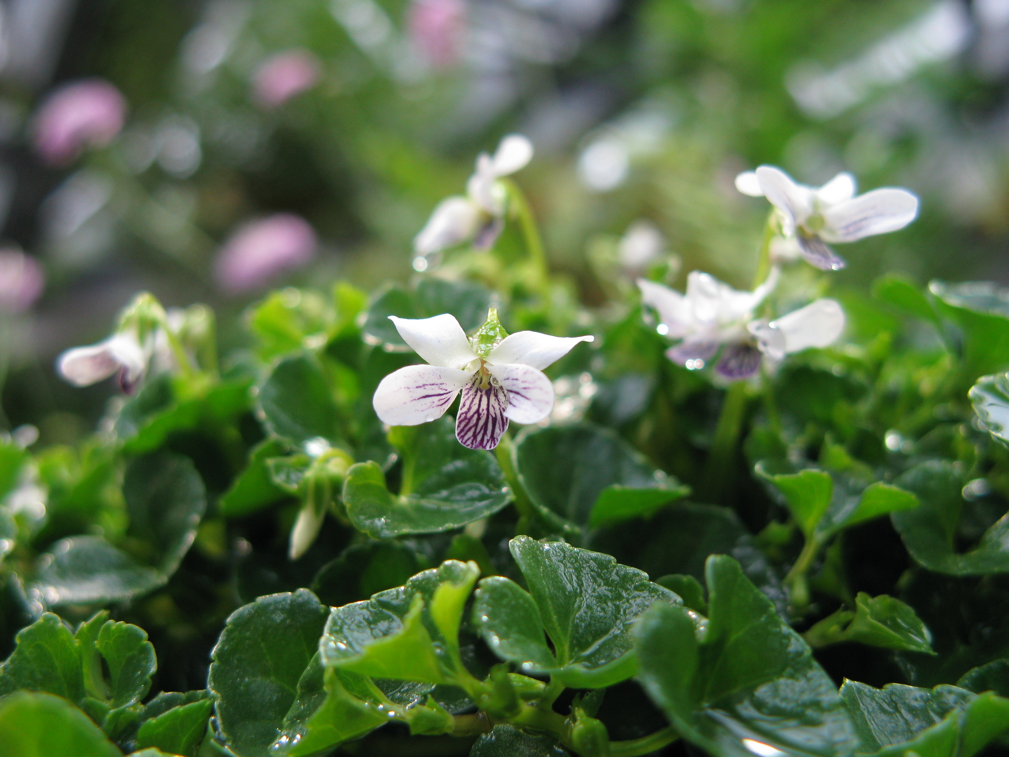 Viola verecunda var. yakushimana